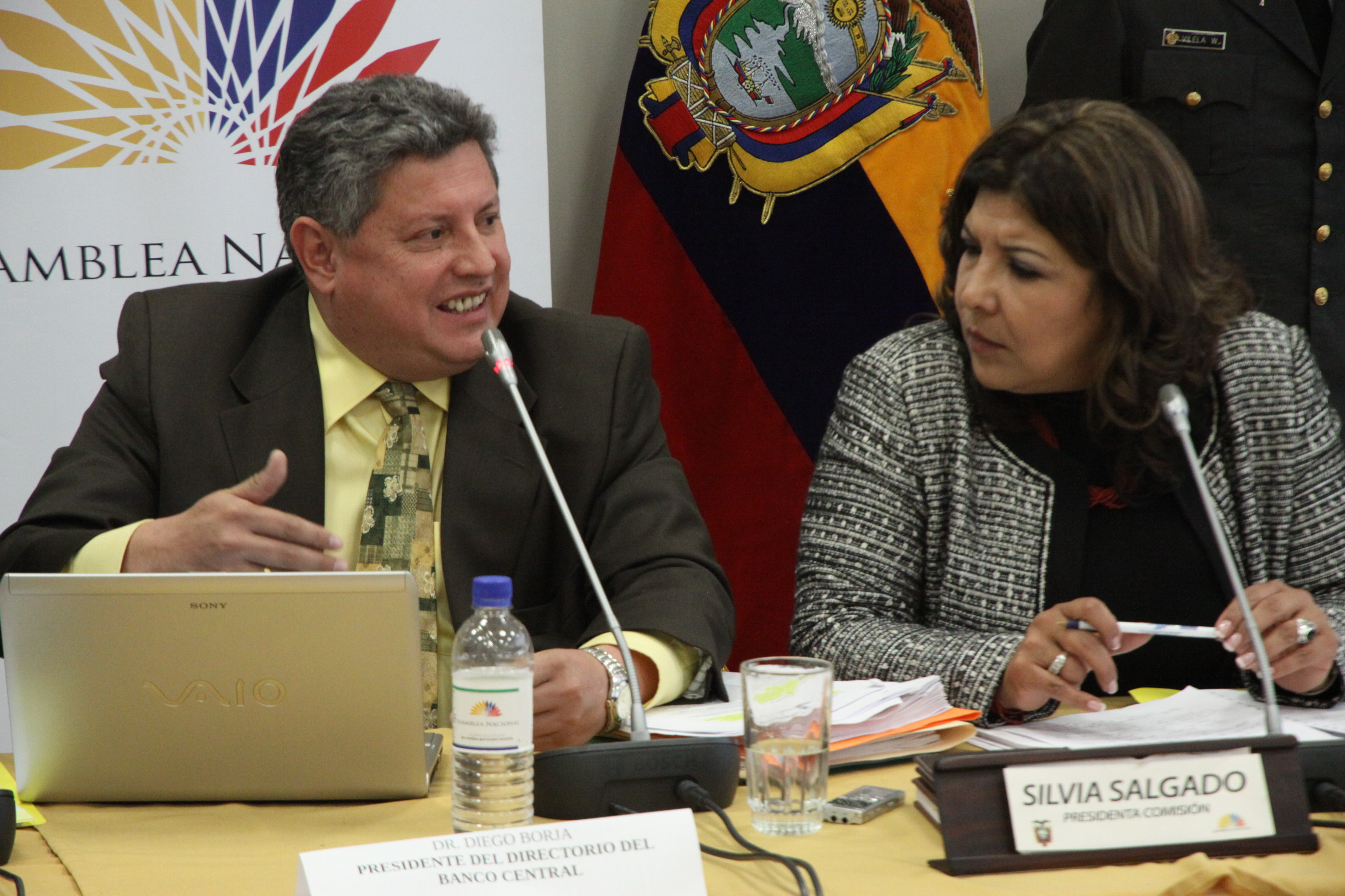 Comisión de Fiscalización y Control Político 10 de Enero de 2011